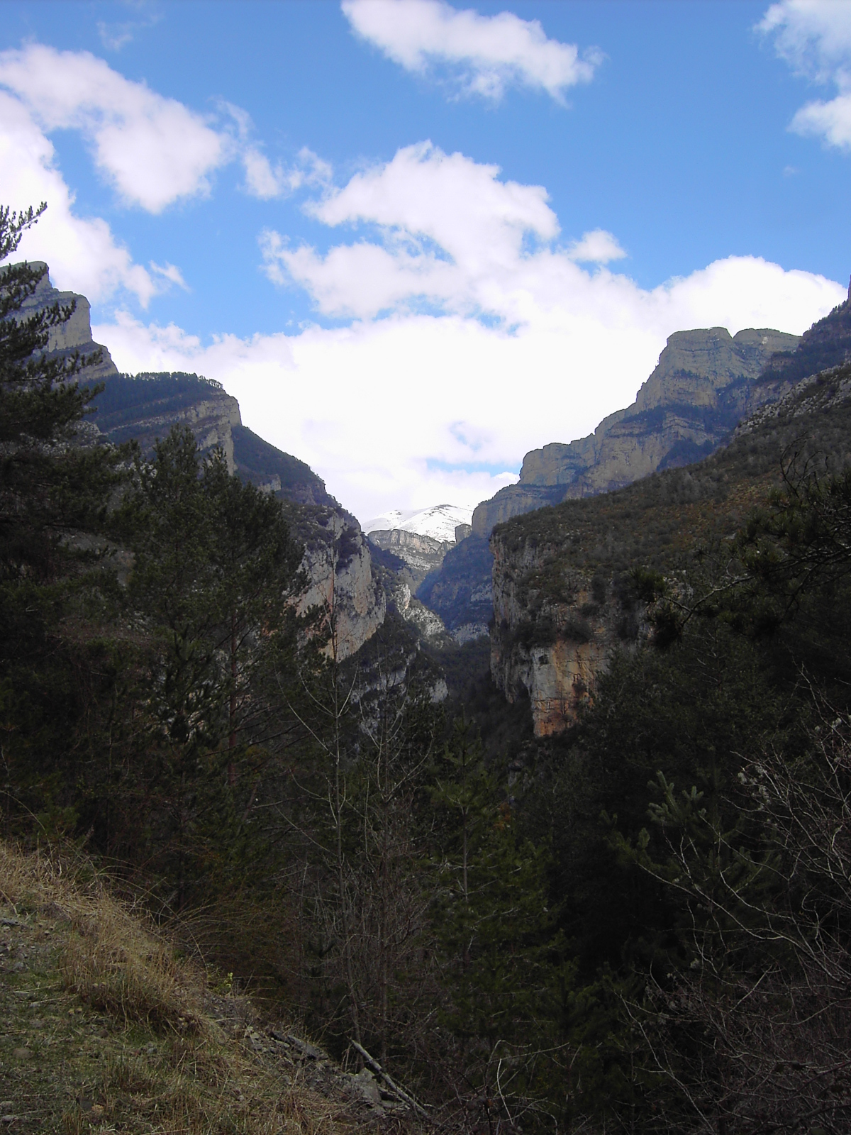 Portiello de Sercuet (Parque Nacional de Ordesa Y Monte Perdido, Huesca, España) visto desde el Valle de Vió.